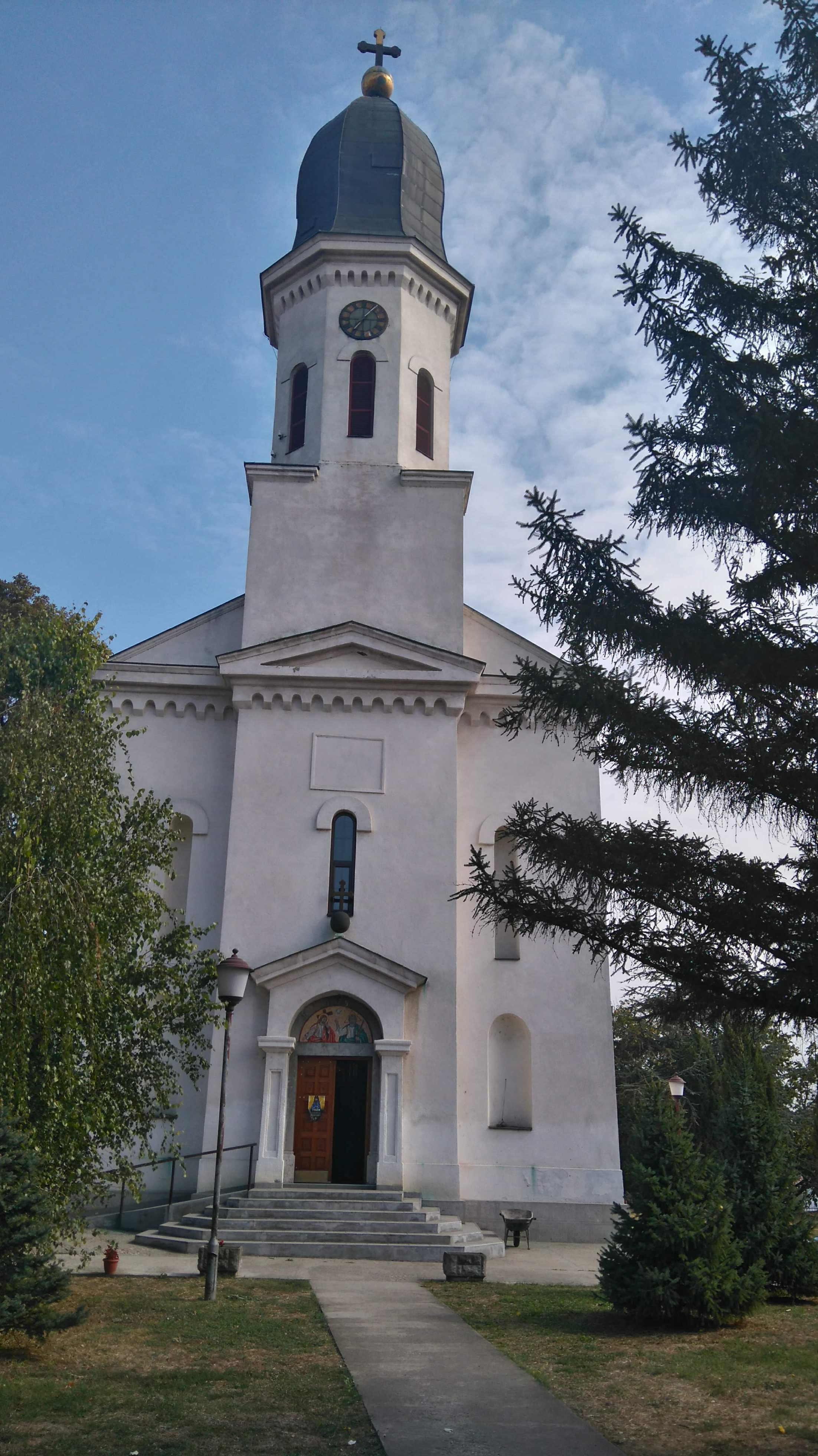 Српски (ћирилица): Crkva Svete Trojice (Grocka)